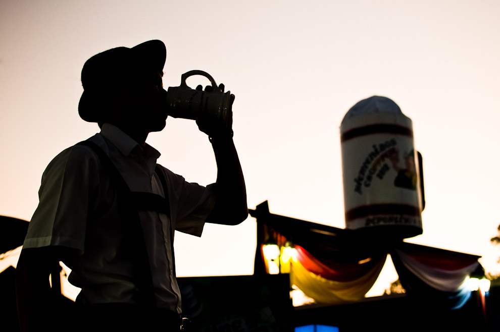 Un joven de Colonia Independencia, termina de beber su vaso de cerveza frente al portal de bienvenida al Club Alemán que sostiene una enorme escultura en forma de manija de Chopp.